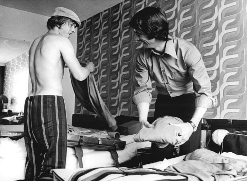 ADN-ZB-Mittelstädt-23.6.74-ma-BRD-Hamburg: X. Fußball-Weltmeisterschaft- Nach der Erreichung der 2. Finalrunde hieß es am 23.6.74 für die DDR-Spieler "Kofferpacken" für die Reise ins neue Trainingsquatier in Rathingen bei Düsseldorf. Links Martin Hoffmann, rechts Harald Irmscher. Am 26.6.74 trifft die DDR-Mannschaft in Hannover auf den Titelverteidiger Brasilien."